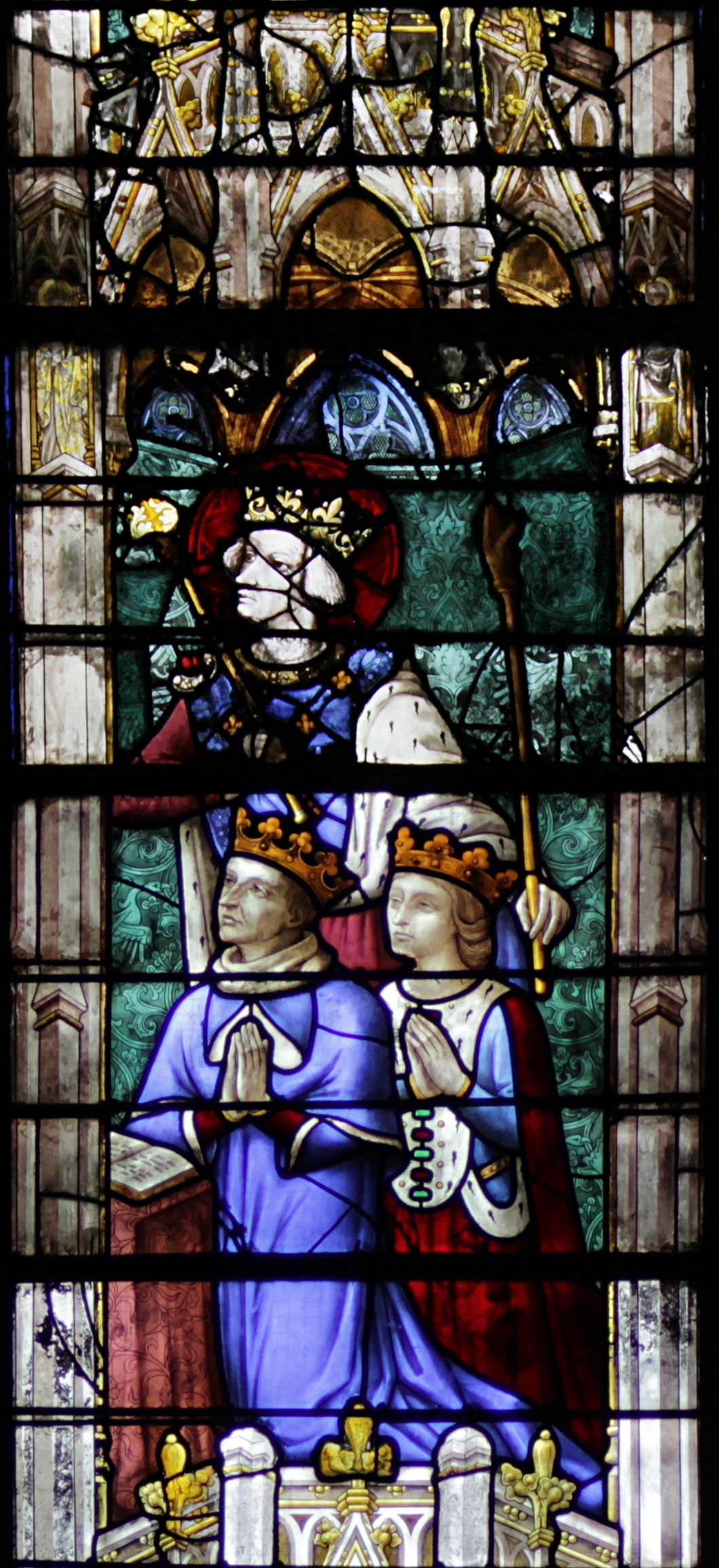 Charlotte de Bourbon (droite) et Jean Lusignan la Marche (gauche)